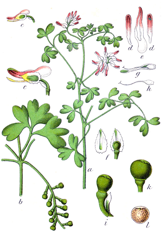 Fumaria capreolata L. Original Caption Windender Erdrauch, Fumaria capreolata